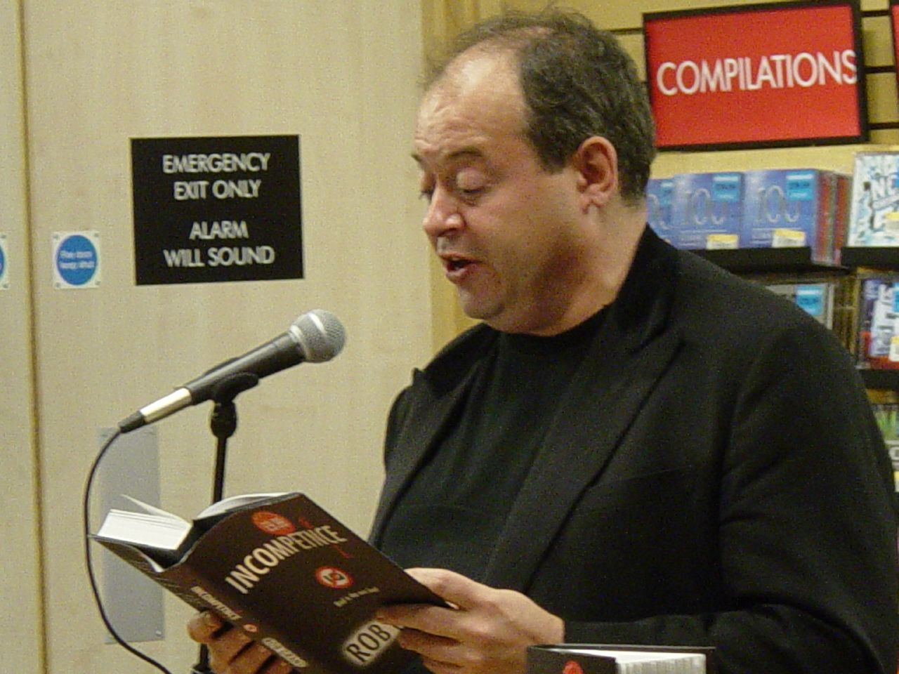 Rob Grant